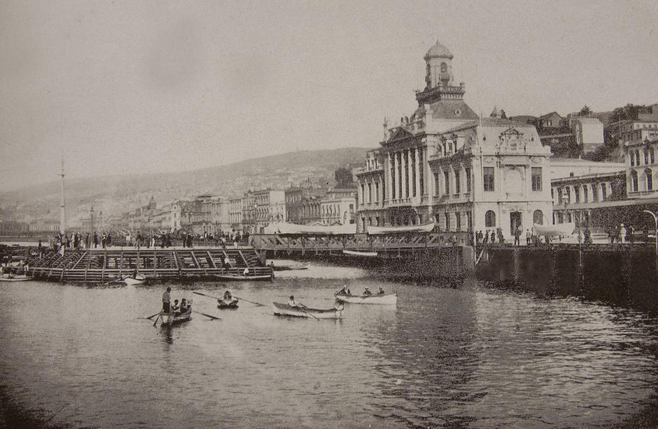 Imagen del Muelle de Pasajeros de Valparaíso de 1888, tomada por Félix Leblanc